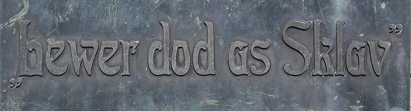 Lewer dod as Sklav - Inschrift auf dem "Hartwarder Friesen" in Rodenkirchen (Gemeinde Stadland)